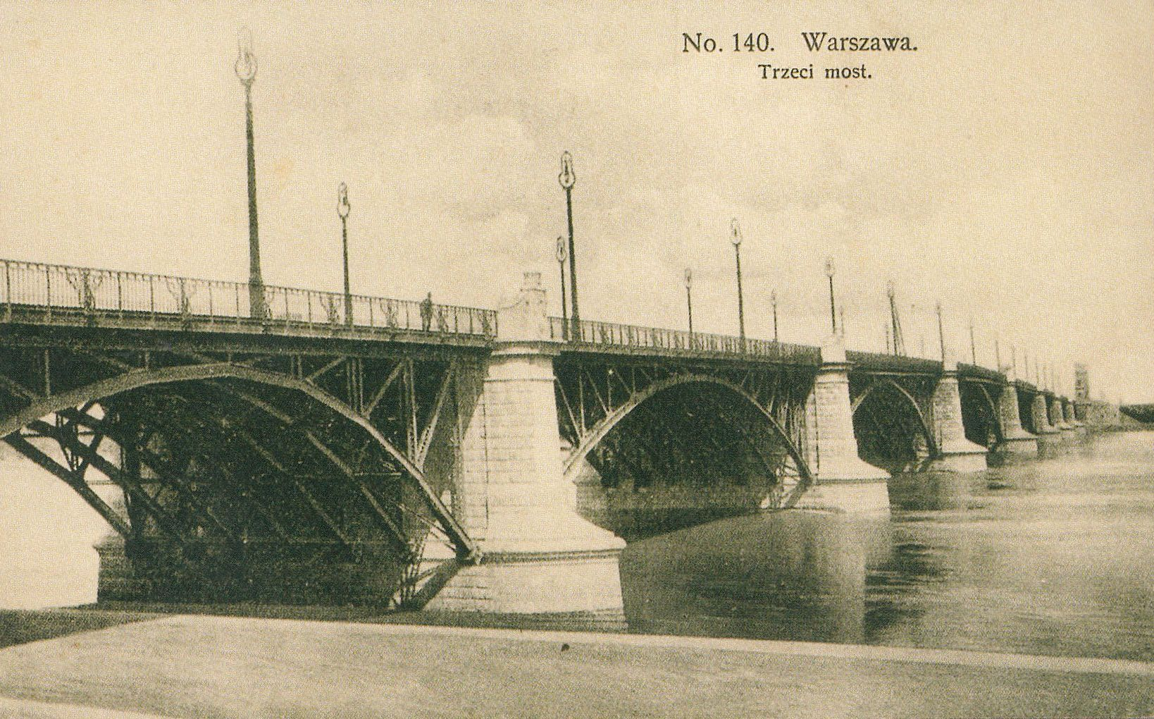 Most Poniatowskiego w Warszawie